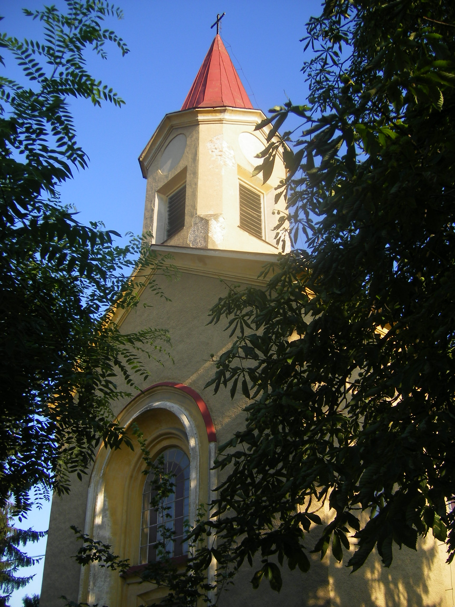 Ács -Szűz Mária római katolikus templom